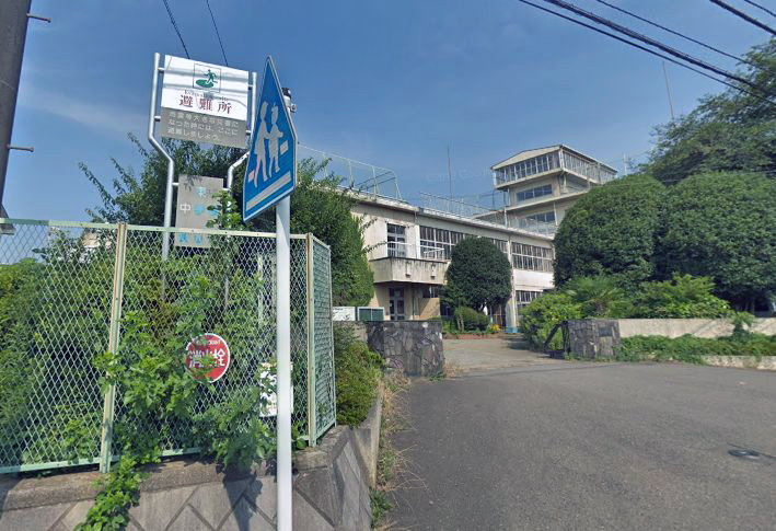 埼玉県狭山東中学校